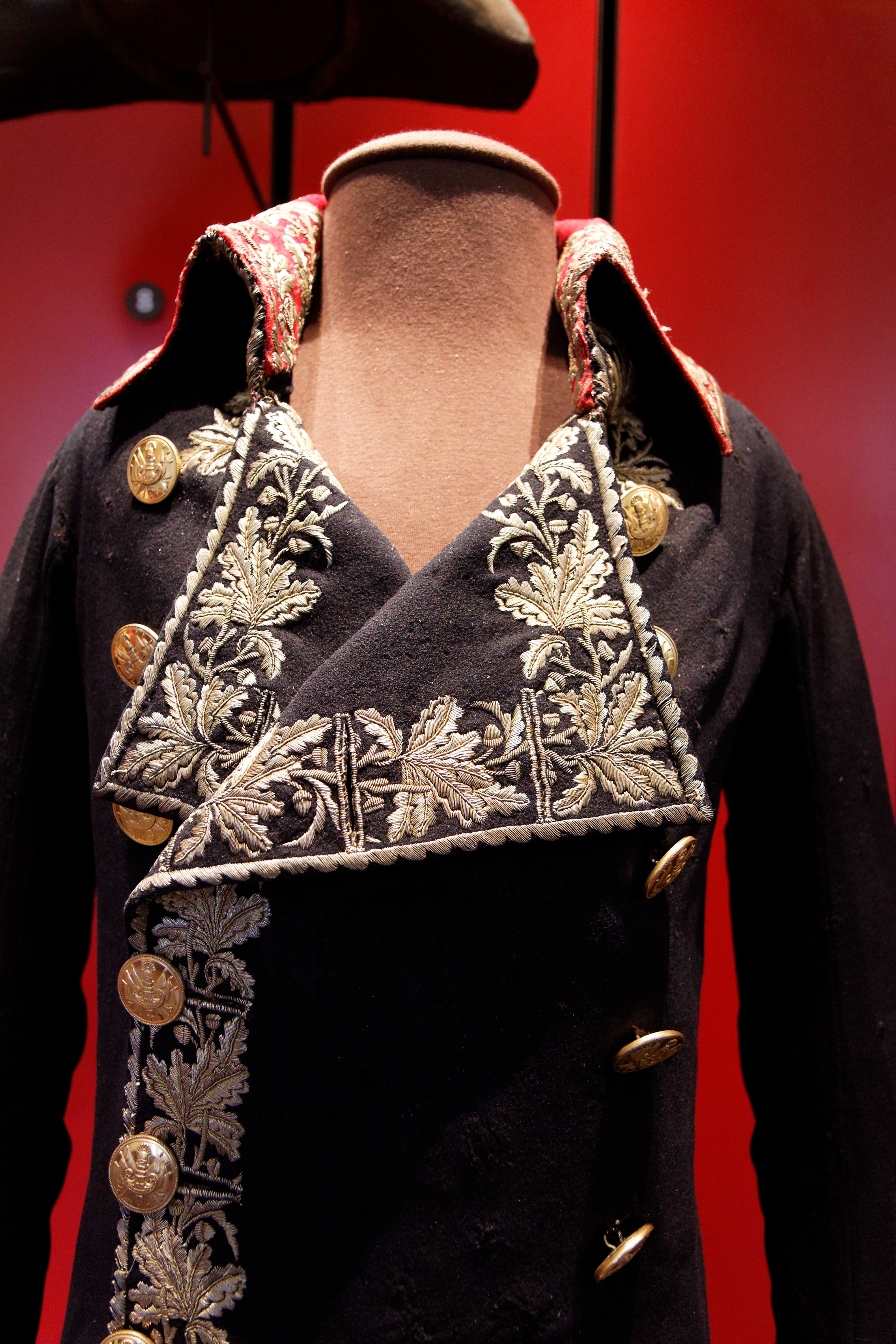 Le général Bonaparte portait cet habit de général lors de la bataille de Marengo le 14 juin 1800. (vers 1798-1800).